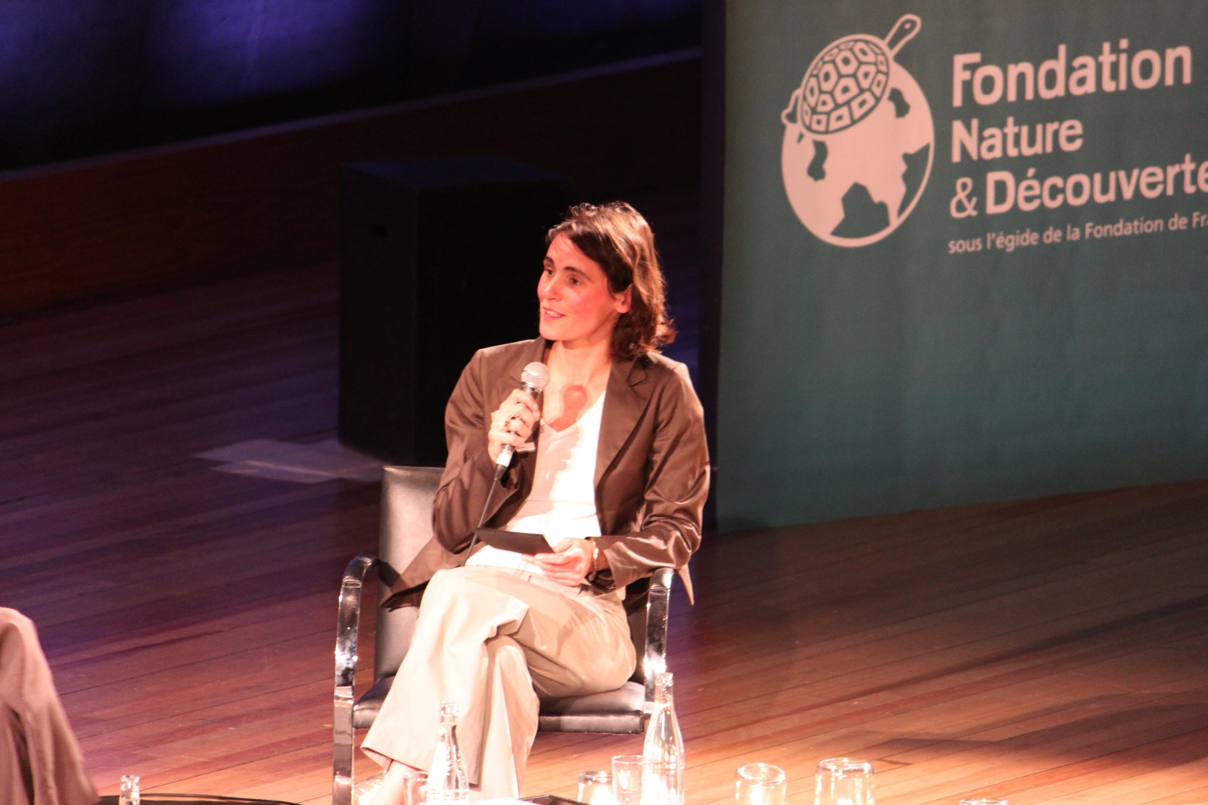 Sonia Devillers à l'Université de la Terre, Paris, 2 avril 2011.